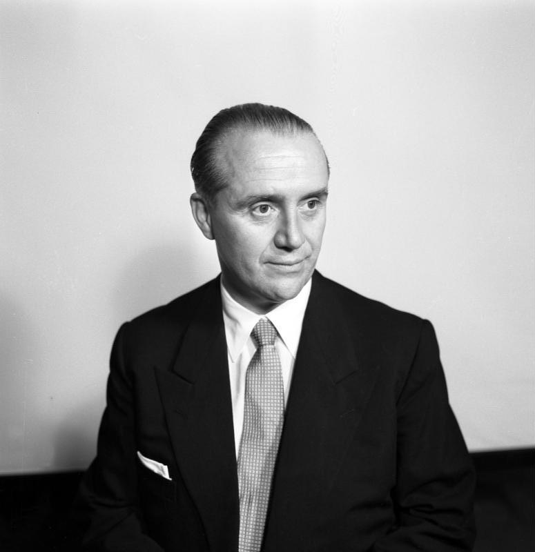 Portrait: Gesandter Luedde-Neurath